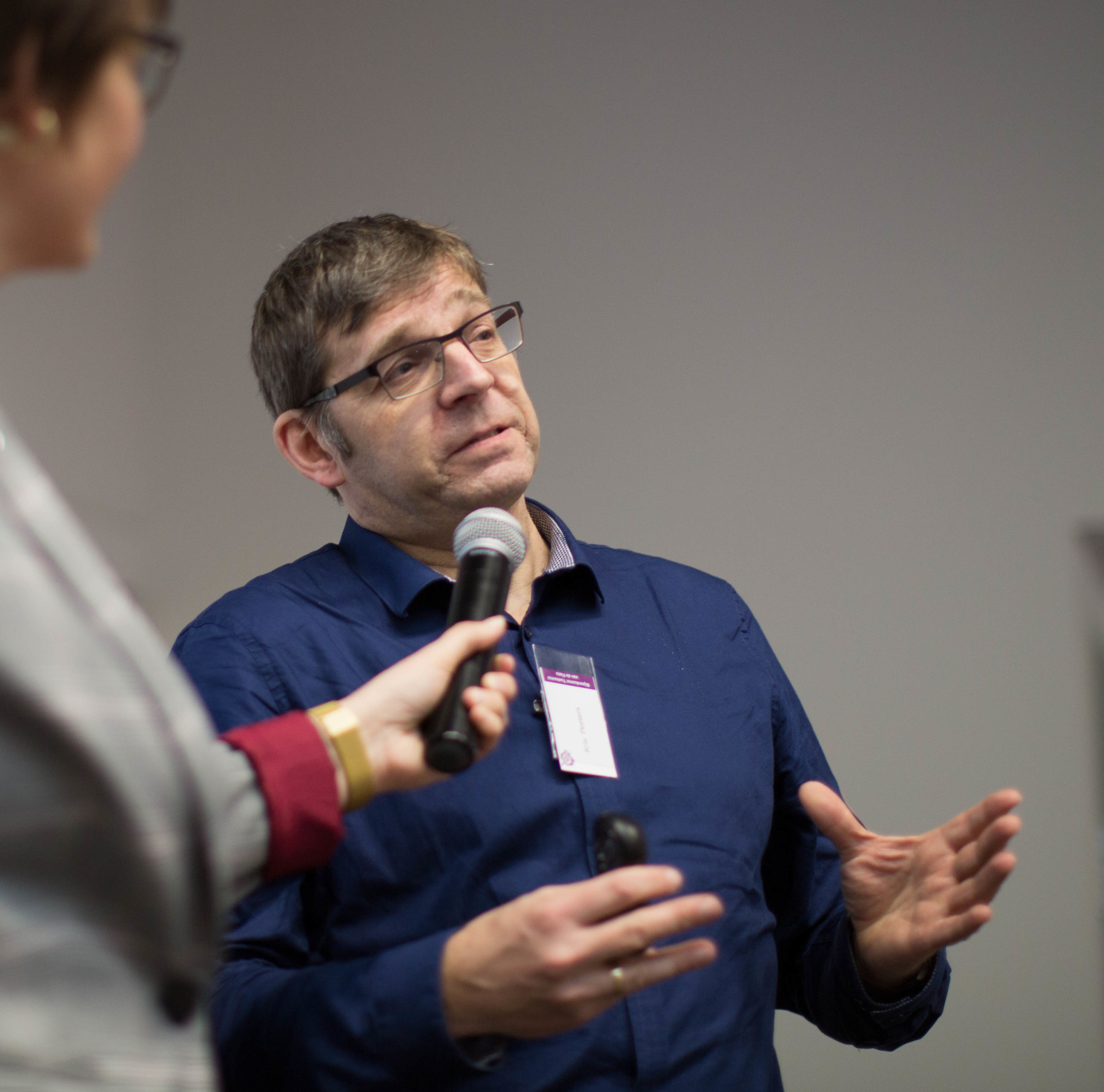 Op 16 januari 2018 organiseerde de Fietsersbond het evenement “Toekomst van de Fiets”. Tijdens het evenement werd de Fietsstad 2018 bekendgemaakt door staatssecretaris Stientje van Veldhoven. De winnaar is gemeente Houten. Zie voor meer informatie